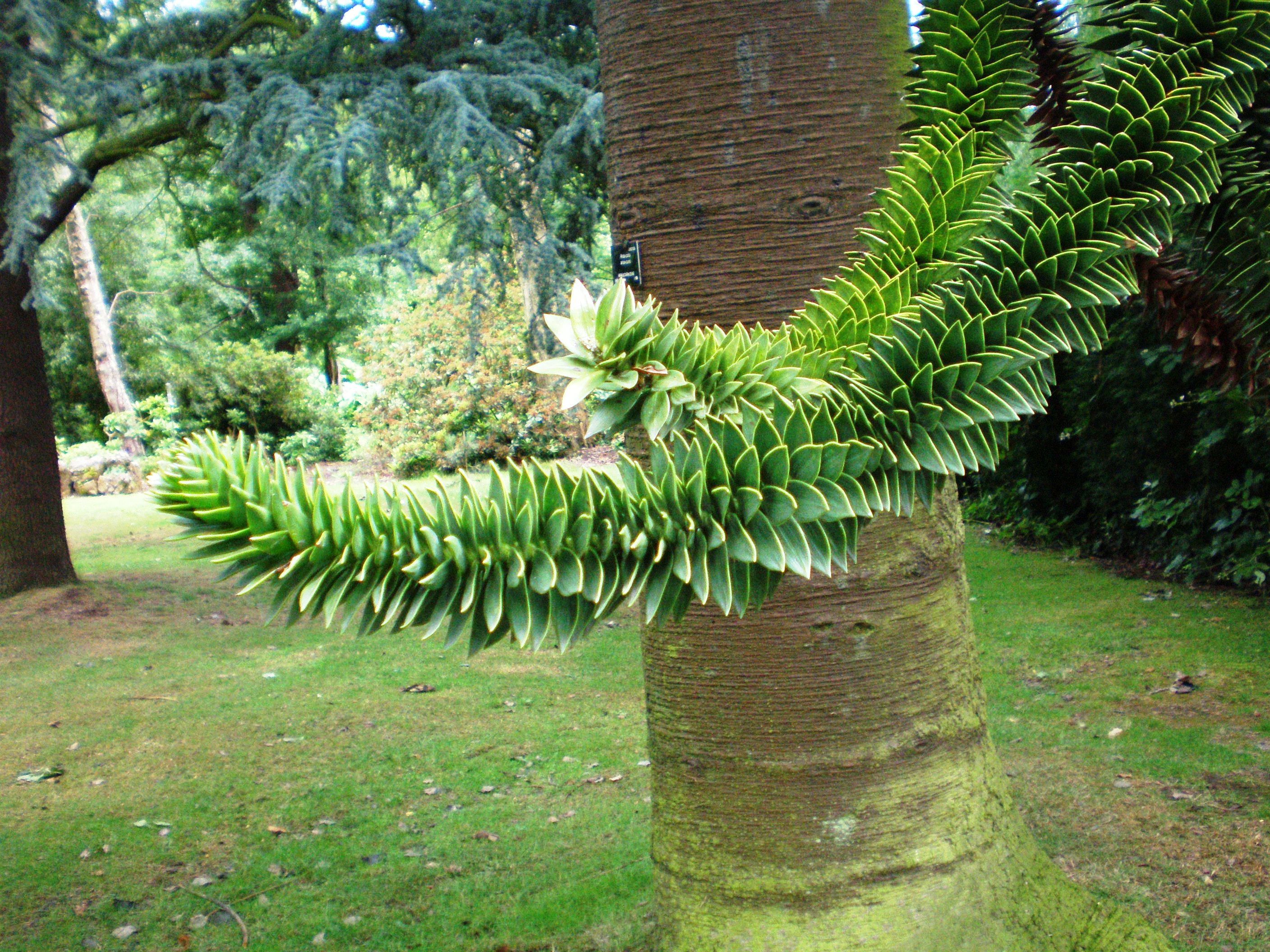 Araucaria araucana